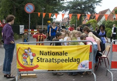 Nationale straatspeeldag georganiseerd door Kinderen Voorrang